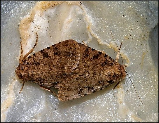 Deux Pyrois effusa accouplés sur une concrétion